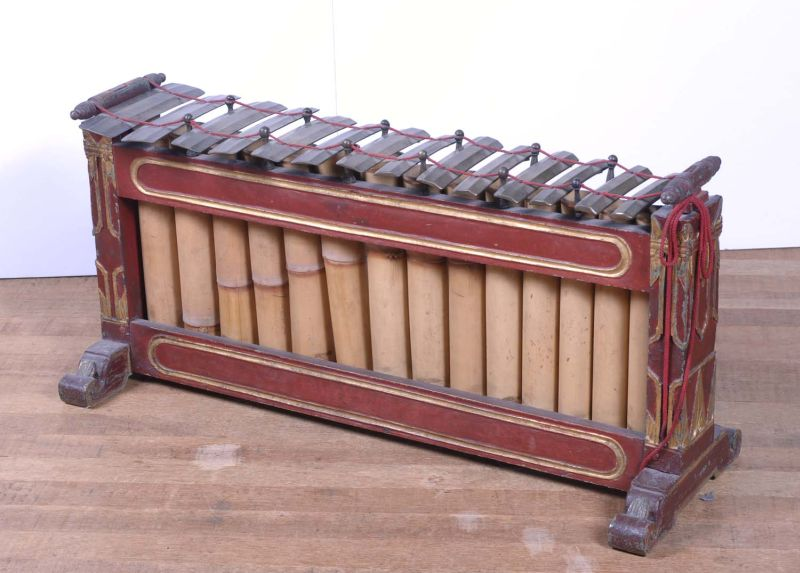 Slaginstrument. Het houtsnijwerk (ukiram) van de onderstellen is gemaakt in de beroemde Djajadipuram volgens aanwijzingen van het toenmalige hoofd. De versieringsmotieven vertonen een melange van 19e eeuwse Biedermeyermotieven (de plantenbak op de gender, de barung en de gambang, het bladermotief) en authentieke Javaanse ornamenten. De gamelan is afkomstig uit de kapatihan van Jogjakarta, waar deze in de tweede helft van de negentiende eeuw werd vervaardigd in opdracht van de regerende patih (eerste minister van het sultanaat Ngajogyaningrat), prins G.P.H. Hadiloesoemo. Deze gamelan werd als losse slendro-gamelan voor het privégebruik van deze patih gebouwd. Er hoort naar alle waarschijnlijkheid geen pelog-helft bij. Er zijn meer gevallen bekend van dergelijke slendro-gamelans uit de Jogja'se kapatihan. De slenthems maakten oorspronkelijk geen deel uit van deze gamelan, evenmin als de onversierde gender barung, die qua klank gewoon een overbodige verdubbeling is van de wél versierde gender barung. . Metallofoon met veertien toetsen, onderdeel van gamelan Slendro Unknown language: Gender panerus